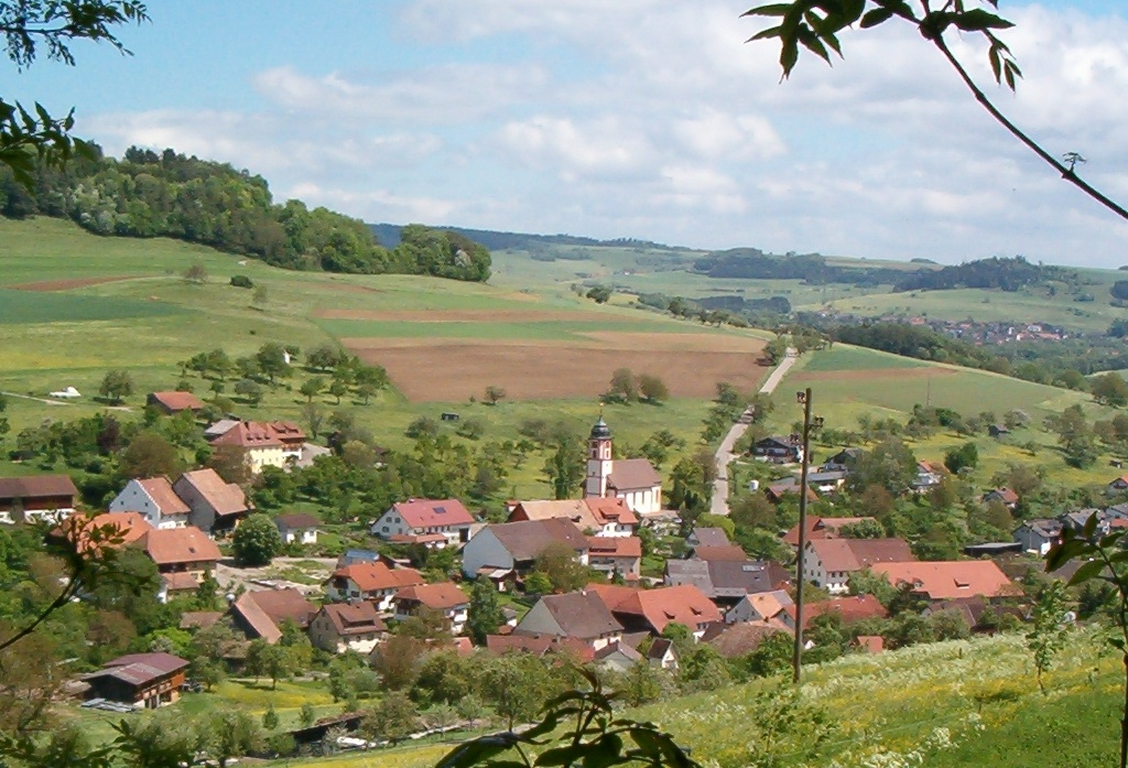 Krenkingen, Blickrichtung Nordosten, über das Tal der Steina hinweg. Rechts oben sind noch einige Häuser des Ortes Untermettingen, Gemeinde Ühlingen-Birkendorf, zu erkennen.